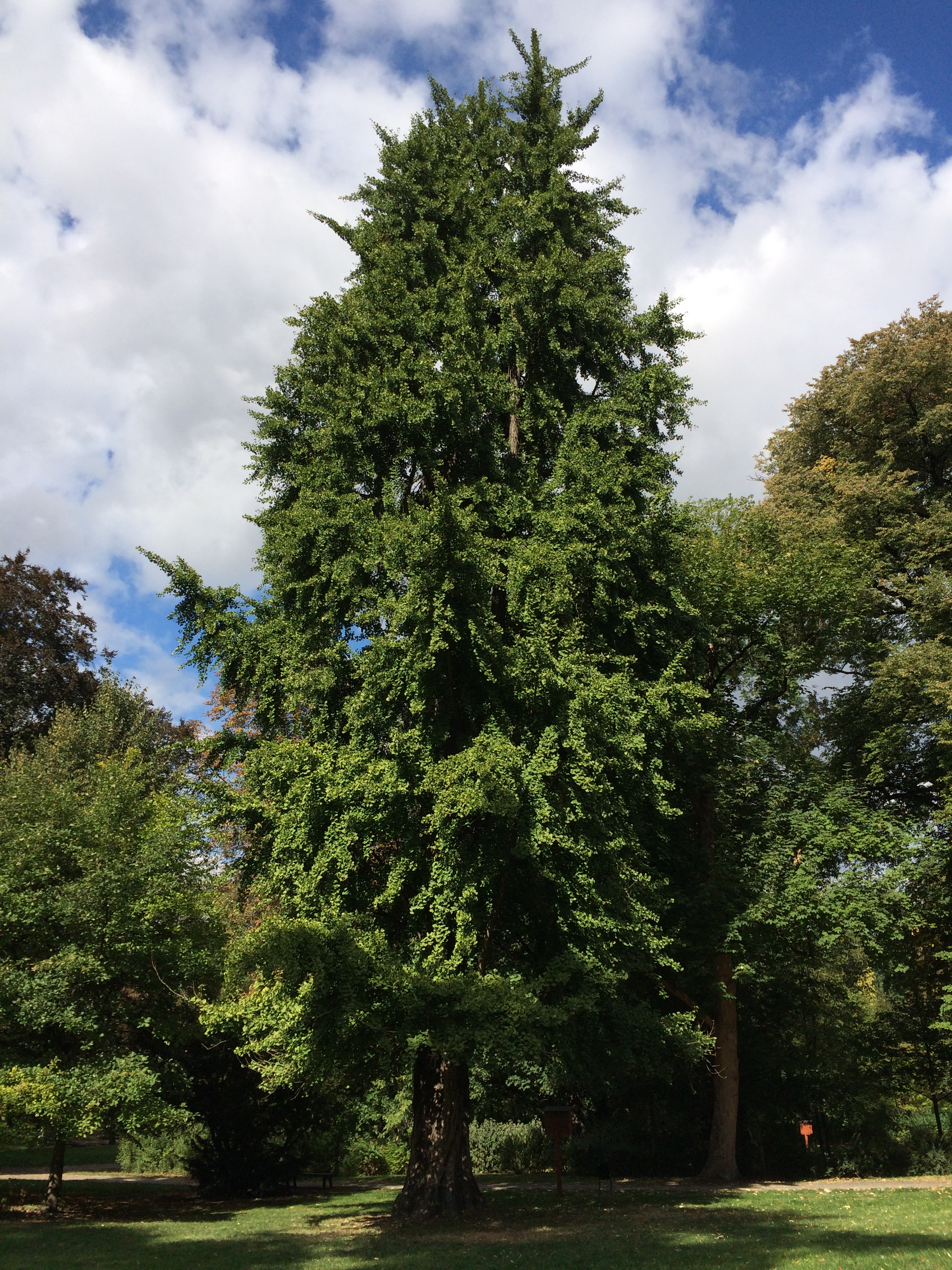 Památný strom jinan dvoulaločný nacházející se v hlavním parteru před zámkem v zámeckého parku v Čakovicích.